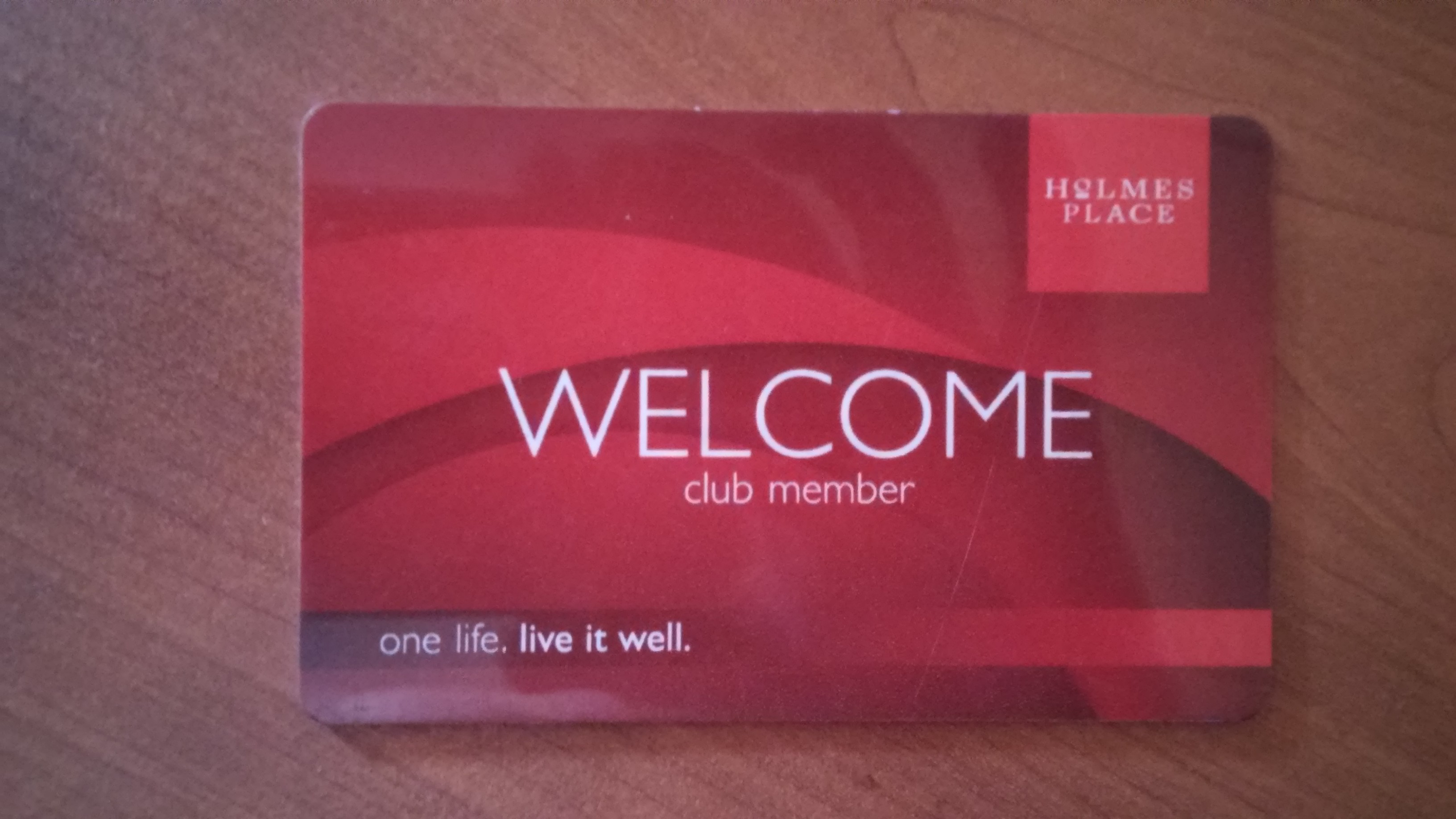 כרטיס Welcome